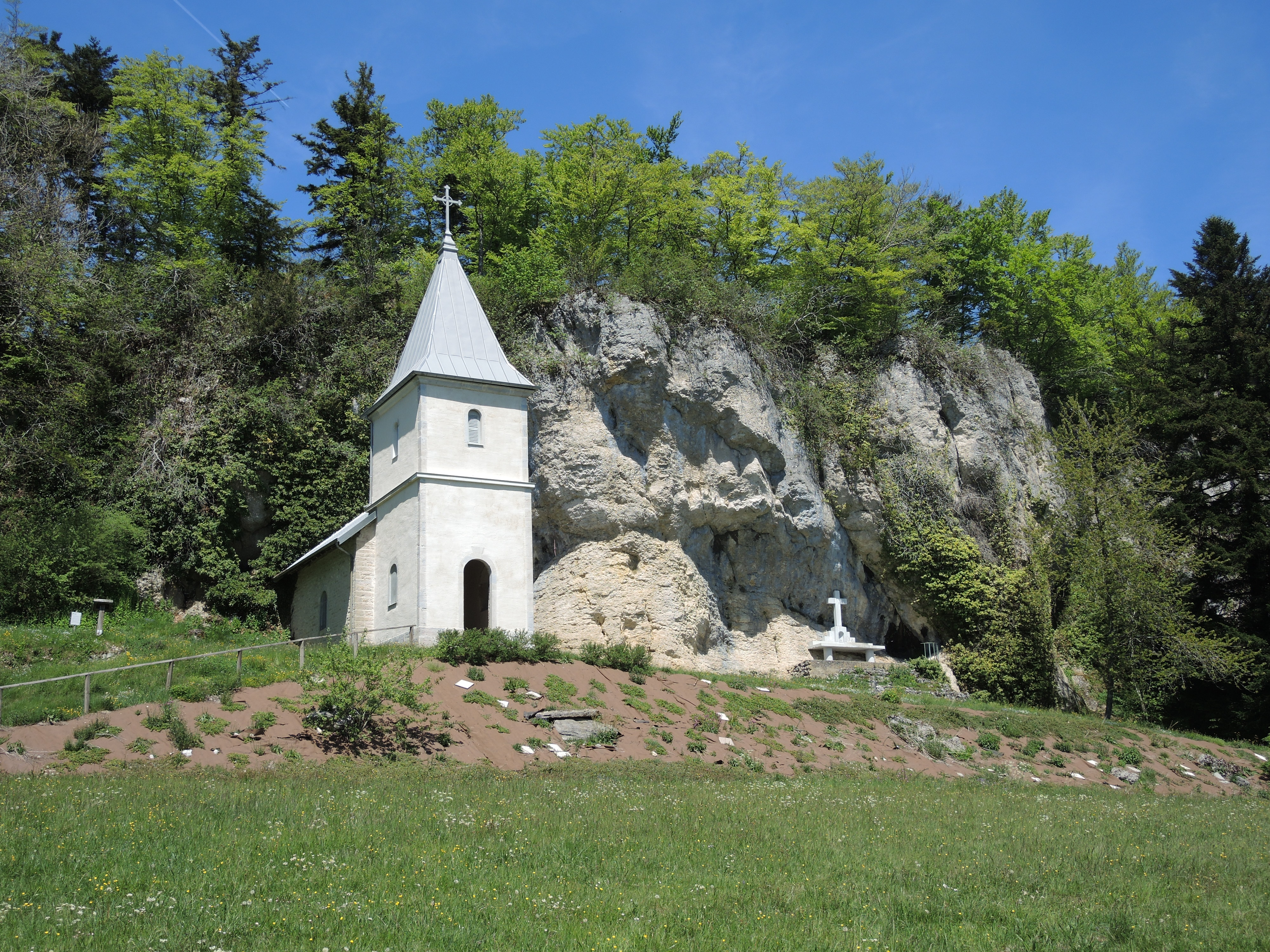 Chapelle Sainte Radegonde, à Vennes. Doubs